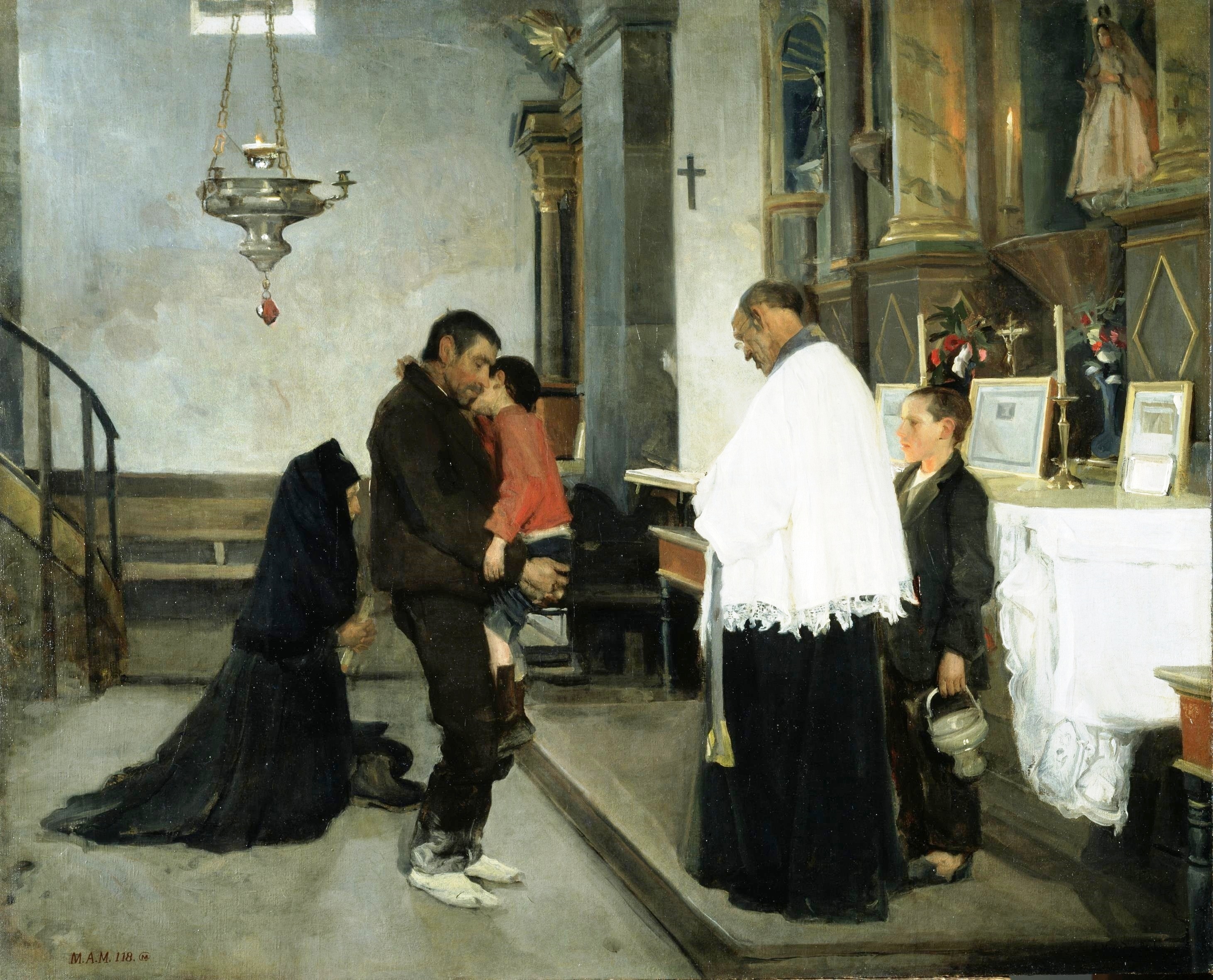 La obra, que lleva por título Salus infirmorum, que traducido al castellano viene a decir Salud de los enfermos, representa el interior de la iglesia de San Miguel de Pajares, (España), y muestra a un sacerdote rezando por un niño enfermo a quien su padre lleva en brazos.